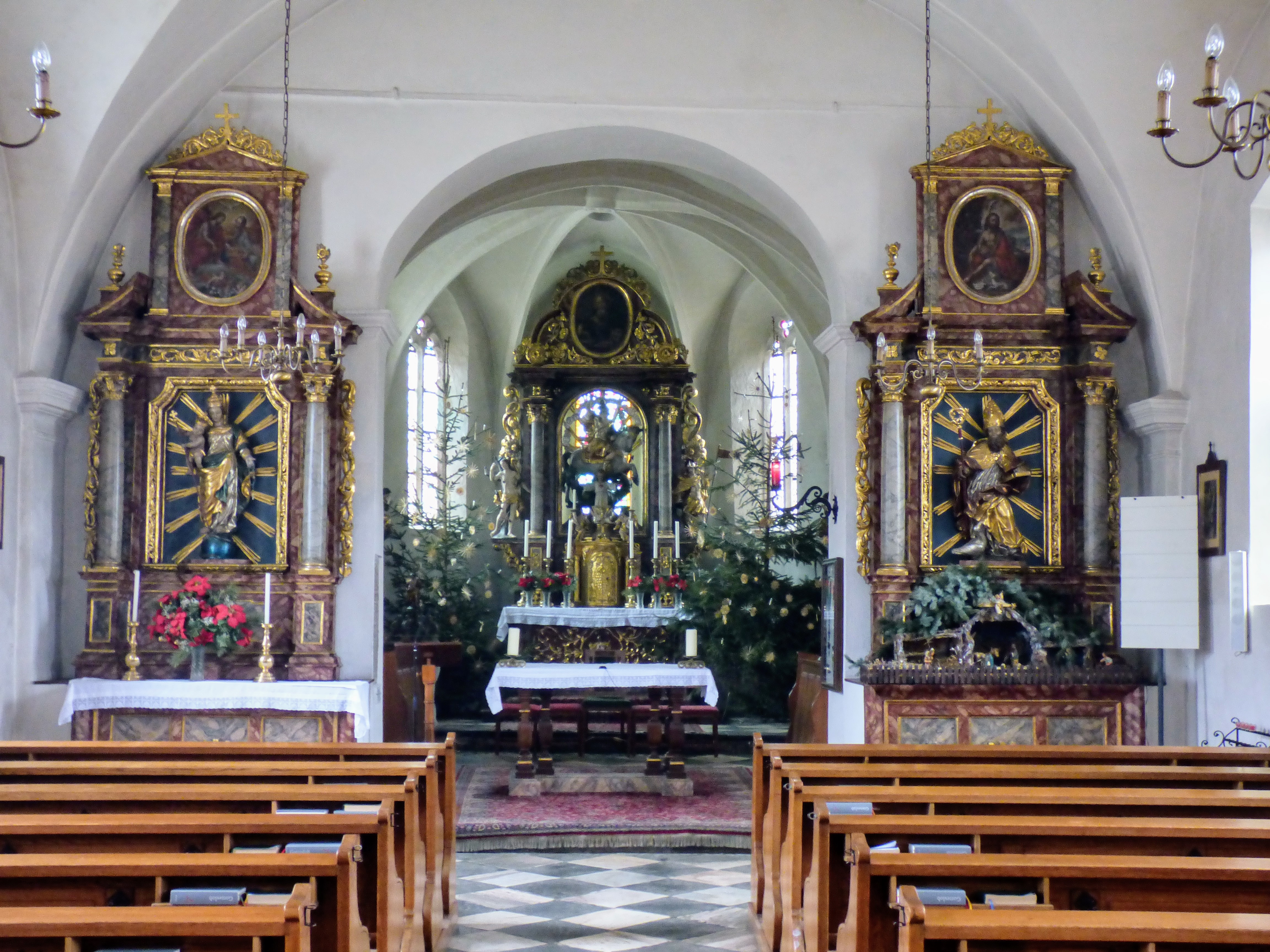 Inneres der Kirche St. Georgen am Sandhof (Klagenfurt)